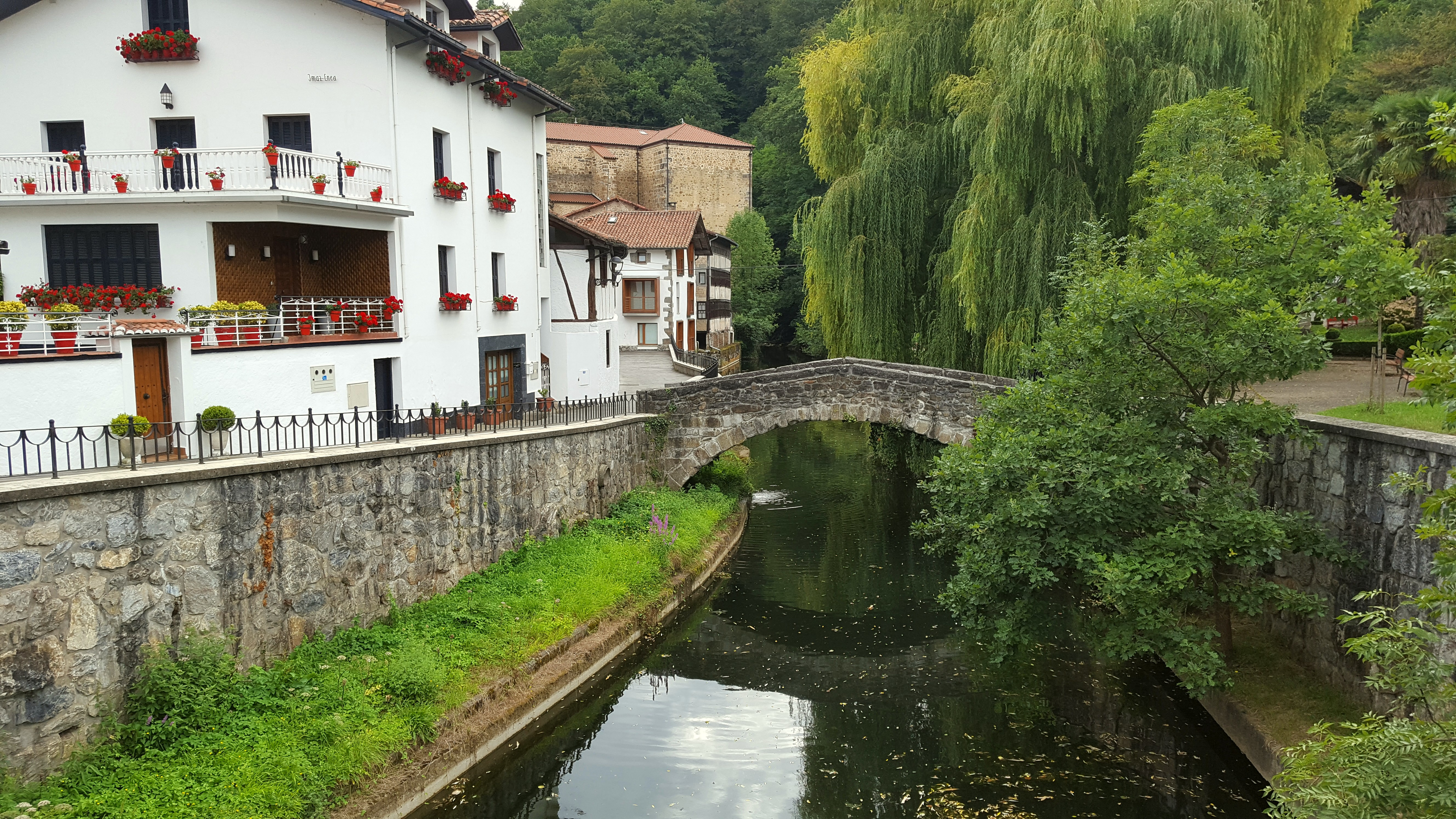 Zaldibia herriguneko zubia